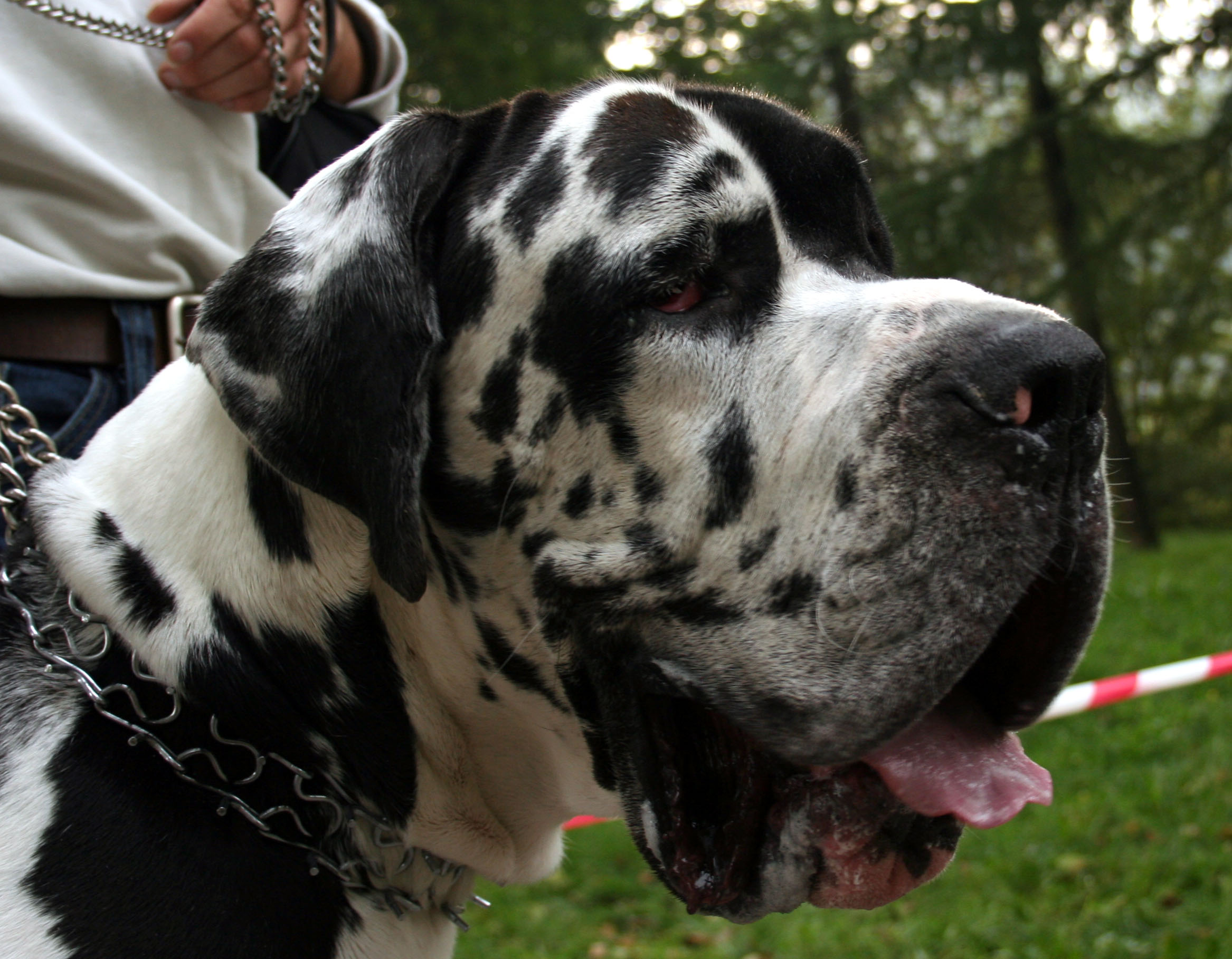 Dog niemiecki